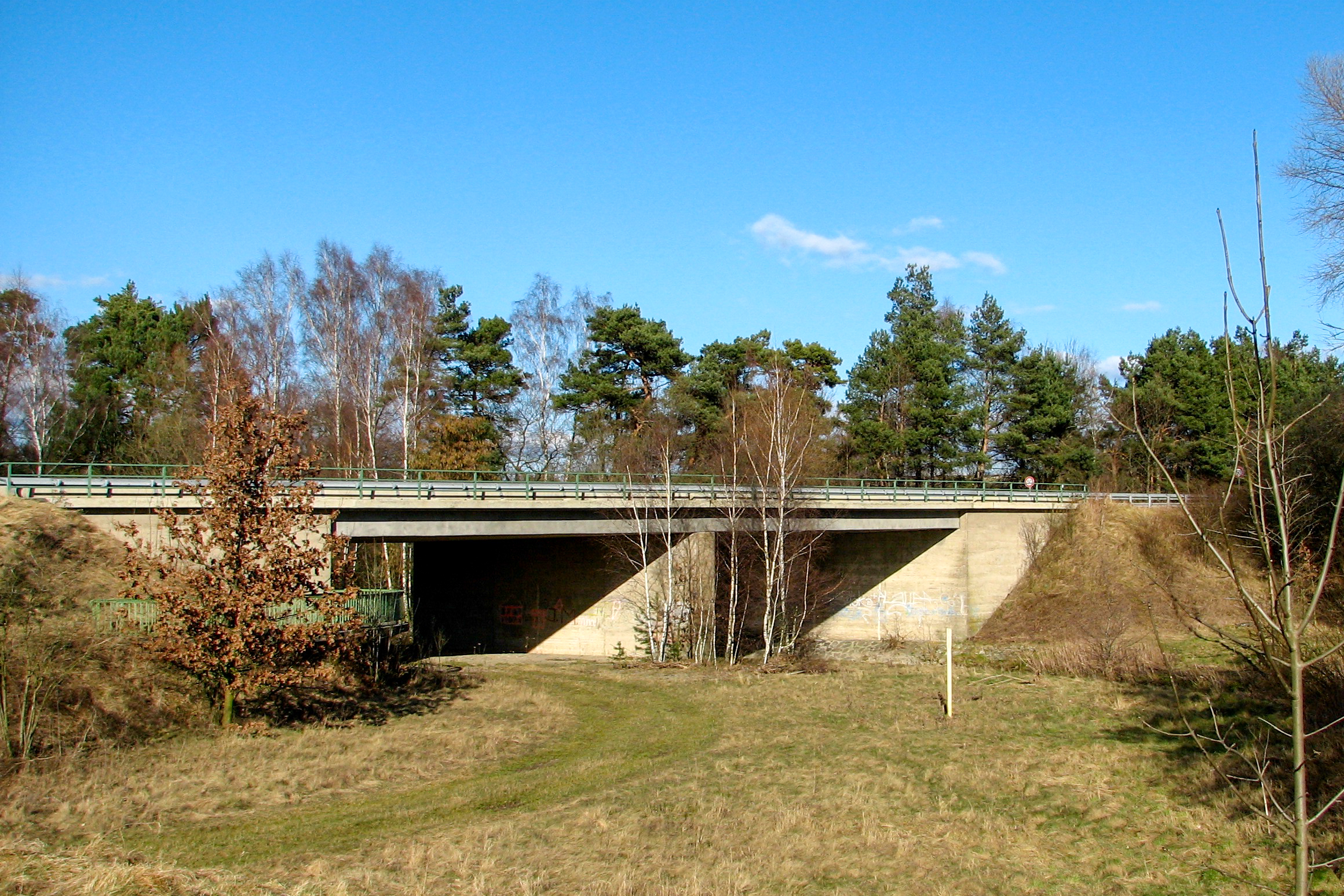 Brücke der Bundesstraße 248 über die Innerste bei Salzgitter-Hohenrode, erbaut 1964